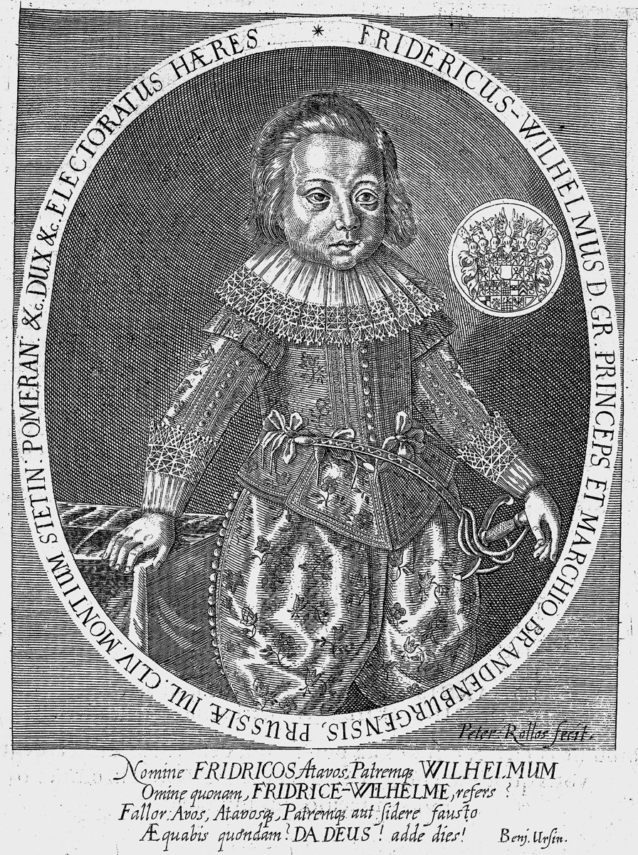 der spätere „Große Kurfürst“ im Alter von 8 Jahren